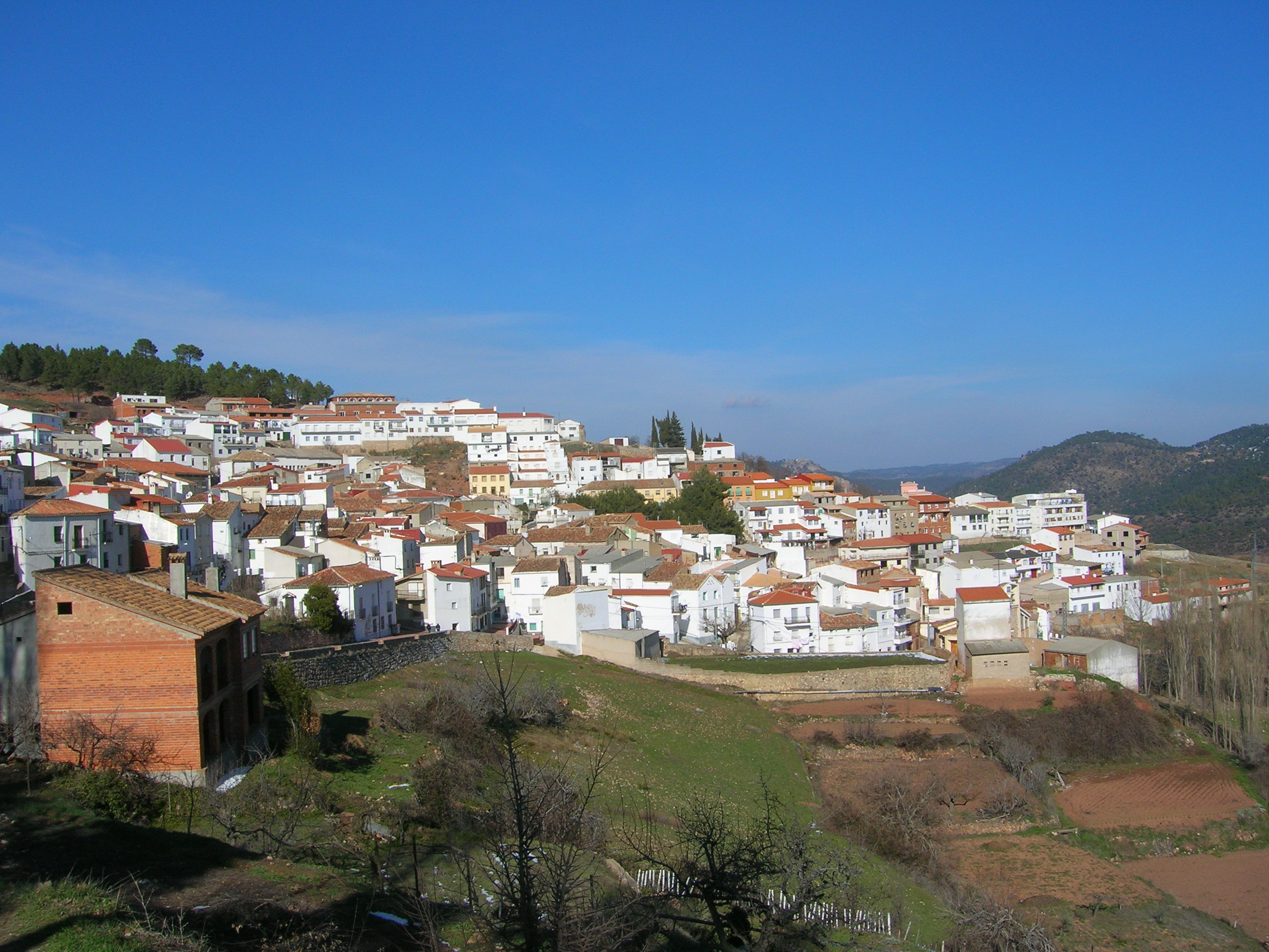 Paterna del Madera, municipio de Albacete, en España. 2 de marzo de 2006.